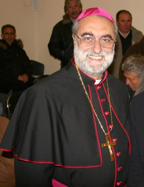 Descrizione: Mons. Rosario Saro Vella in visita al Municipio di Canicattì (AG) Data: febbraio 2008 Fonte: Opera Propria Autore: Solfano